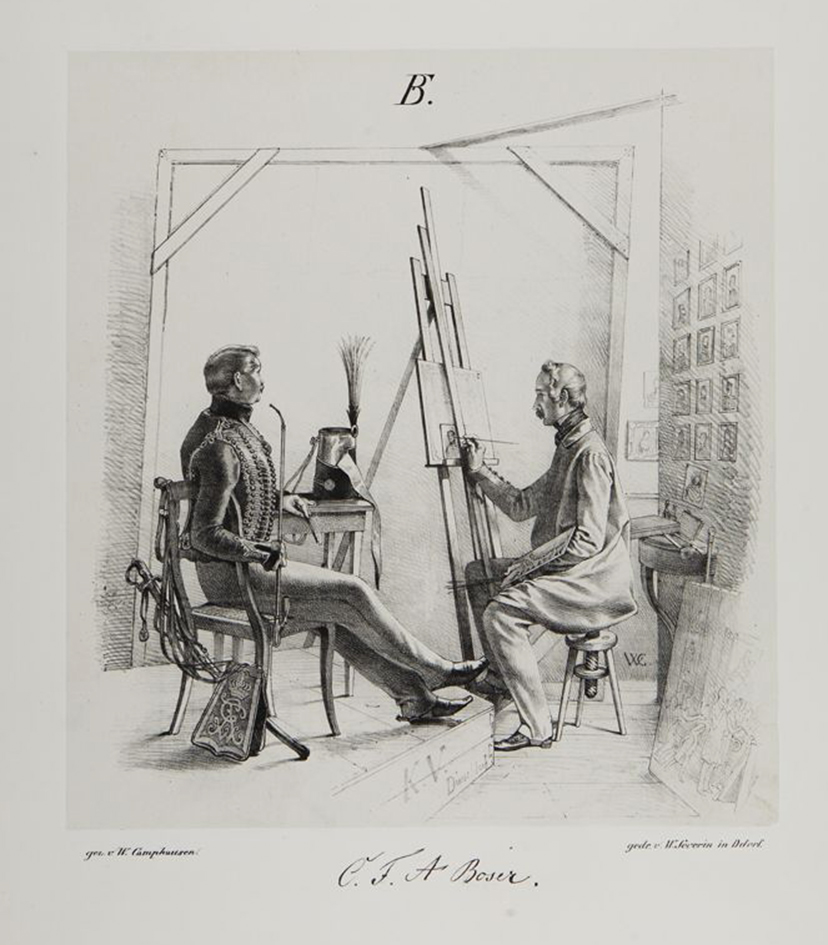 Karl Friedrich Adolf Boser in seinem Atelier, porträtiert einen Offizier, Illustration von Wilhelm Camphausen in Schattenseiten der Düsseldorfer Maler, 1845